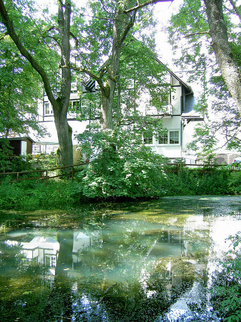 The source of Lahn, a river in Germany Description in de wikipedia Beschreibung: Lahnquelle beim Lahnhof/Netphen Quelle: eigenes Foto Fotograf/Zeichner: Brego Datum der Aufnahme: 22. Juli 2004